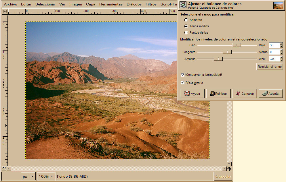 Ejemplo de balanceo de color en Gimp.